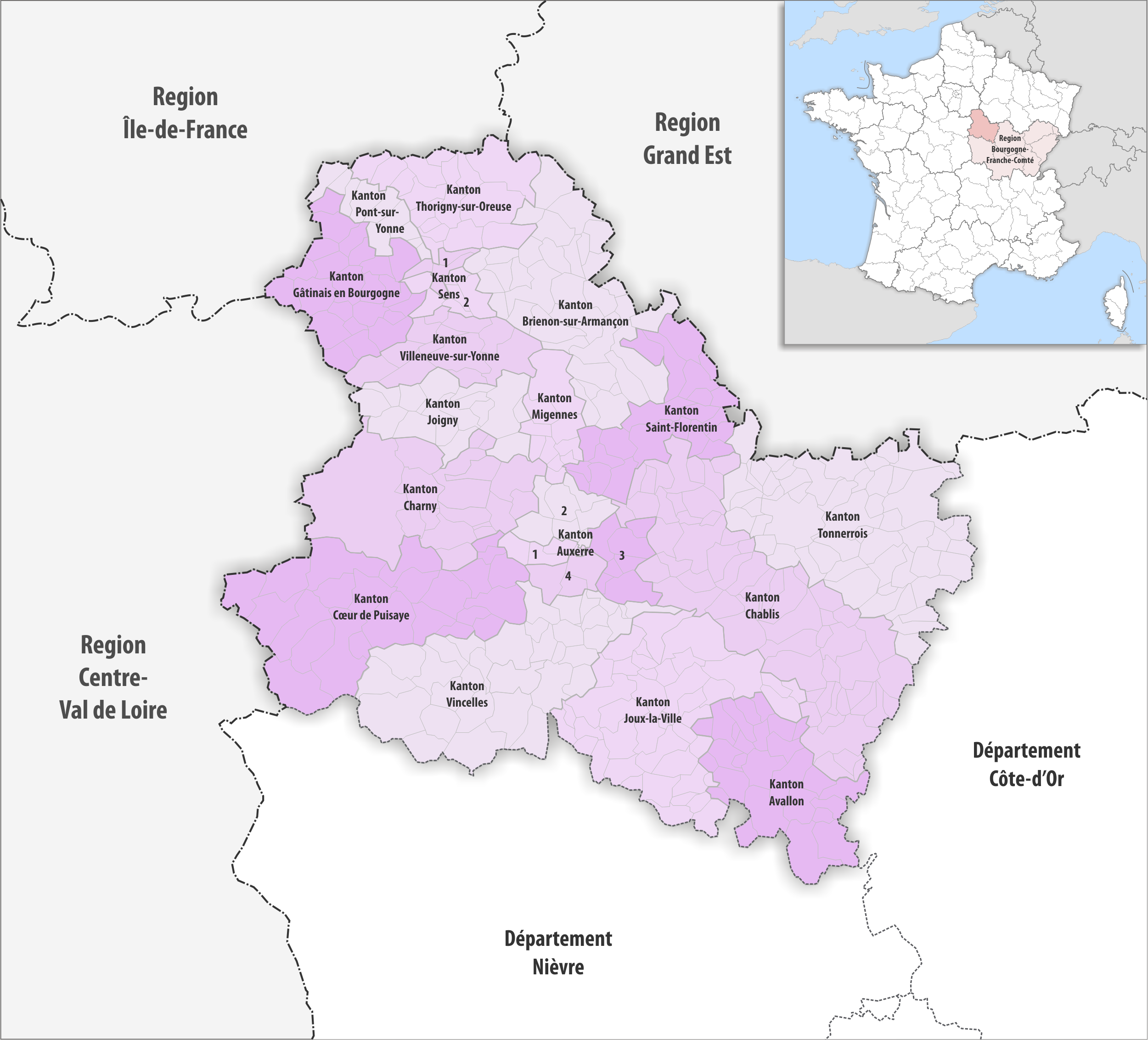 Gemeinden und Kantone im Departement Yonne